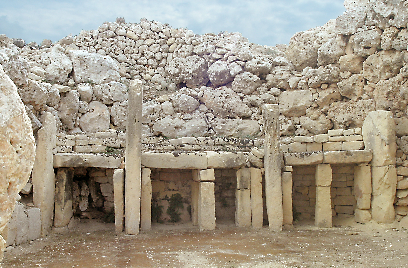 Temple de Ggantija, niches dans abside